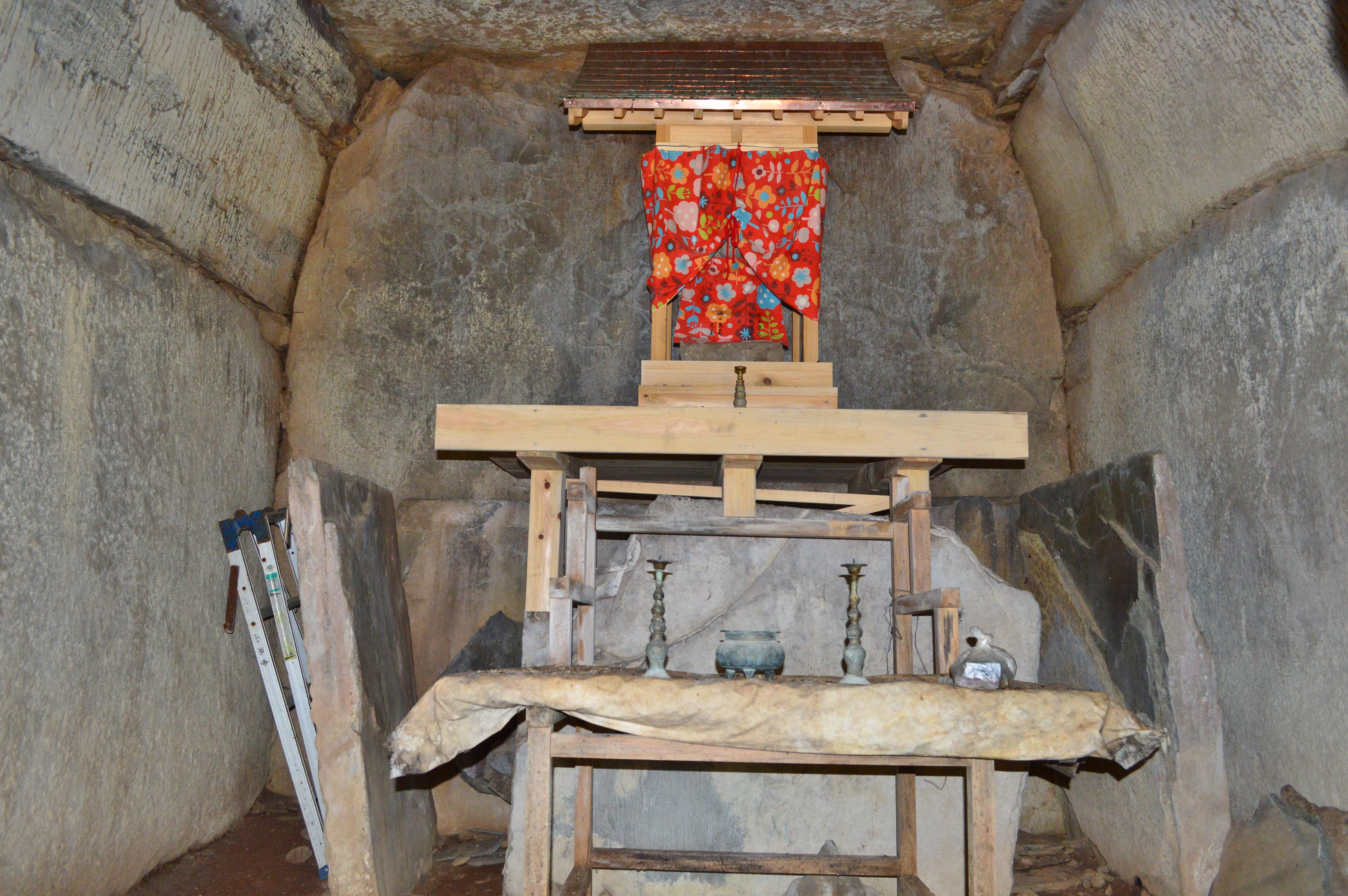 三明寺古墳 石室玄室 Nikon D3200